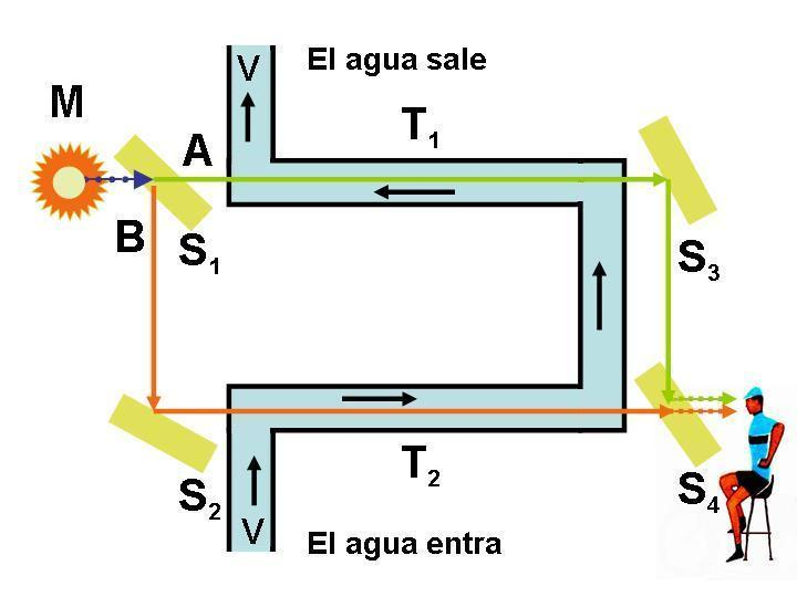 Dibujo de mi autoría